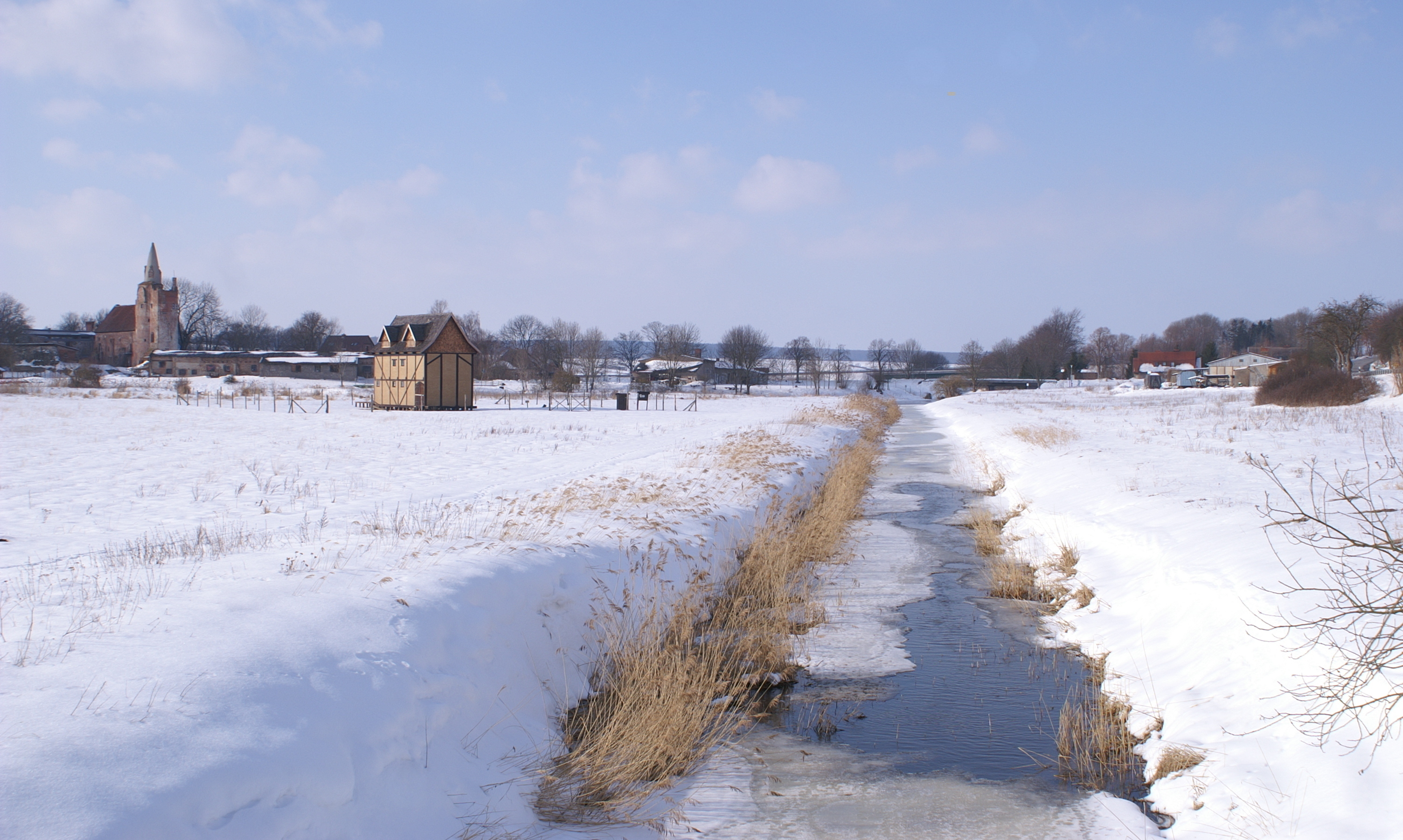 Großer Landgraben bei Klempenow, links Burg Klempenow, daneben der Wehrspeicher Wodarg